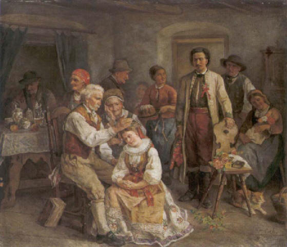 Kroatische Edelbraut